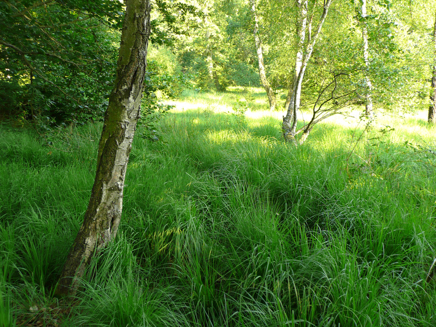 Moorige Fläche mit Birken auf dem Hühnerfeld